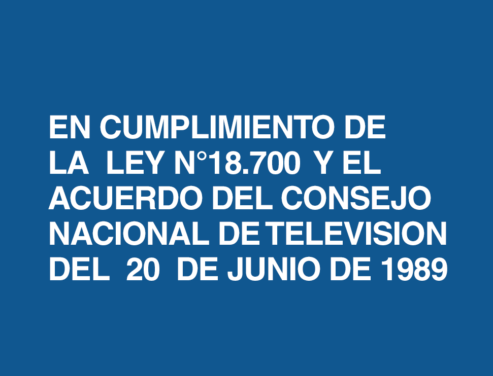 Placa exhibida antes de cada anuncio de propaganda política emitida para el plebiscito nacional de Chile de 1989 (a diferencia de otras elecciones, la propaganda no fue emitida en bloques de 15-20 minutos, sino que en anuncios de 40 segundos repartidos entre las tandas comerciales de los canales).